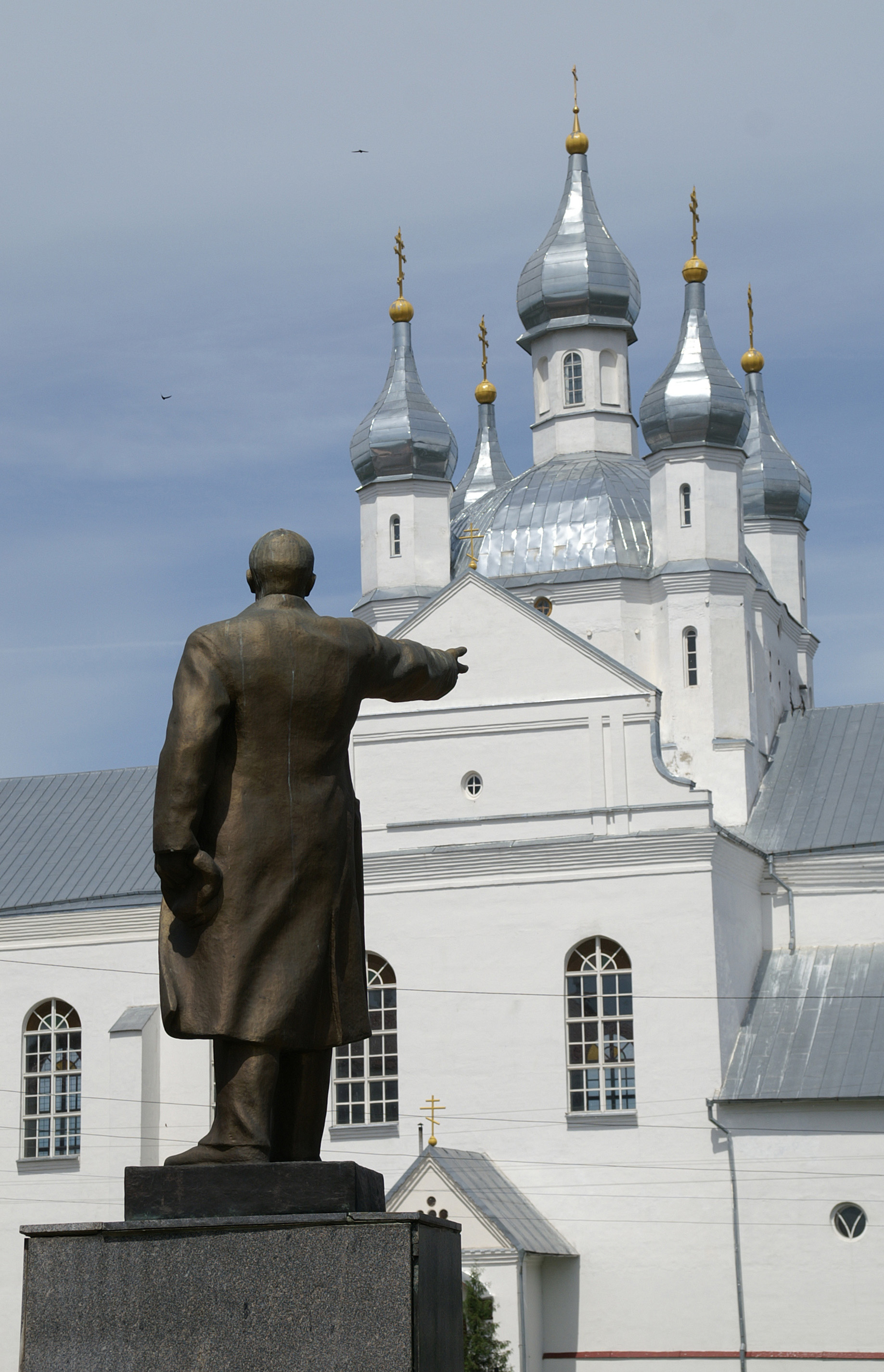 Беларуская (тарашкевіца): Спаса-Праабражэнскі сабор. г. Слонім This is a photo of Belarusian heritage monument. Reference number: 413Г000507 ( WLM)